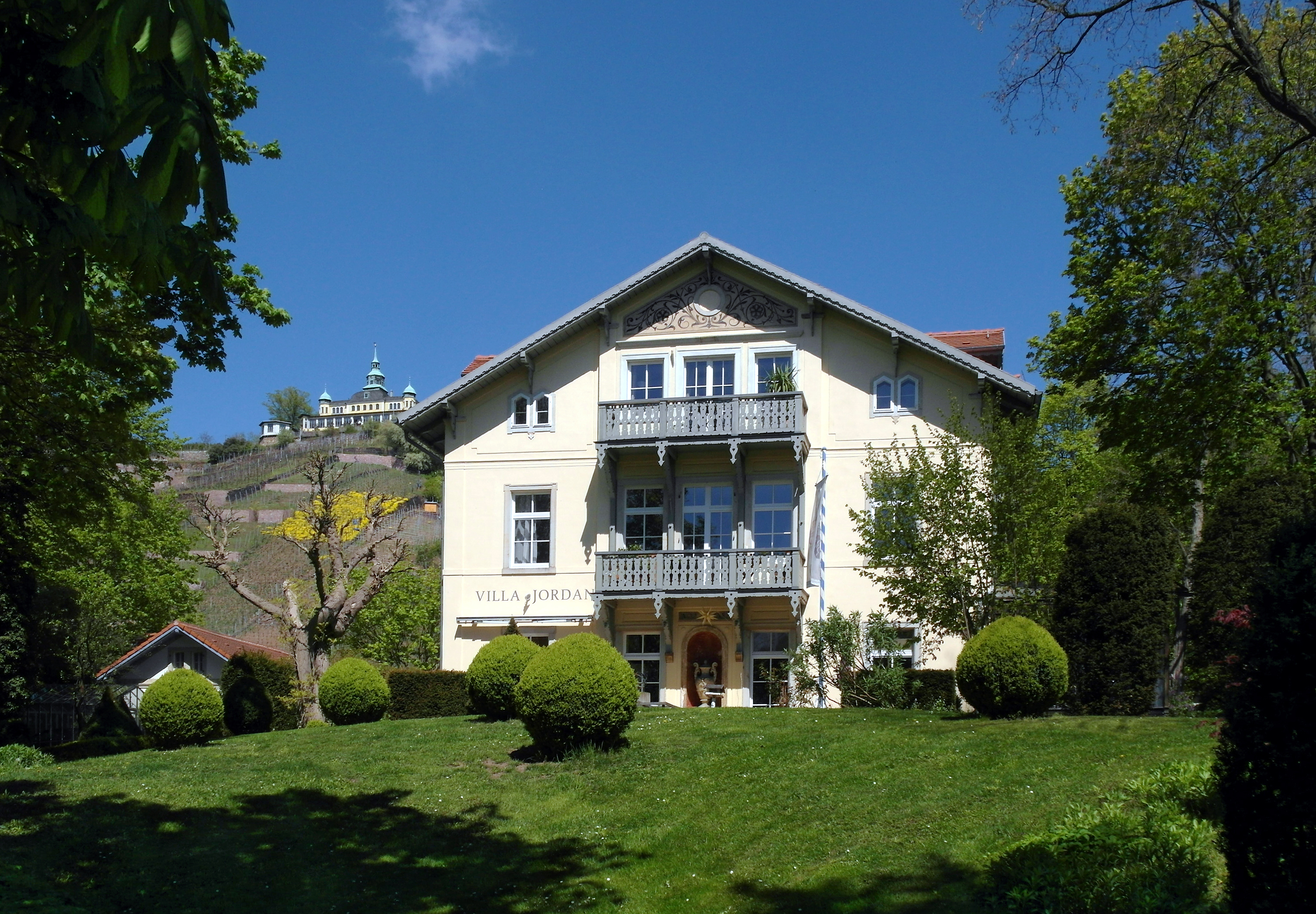 30.04.2017 01445 Radebeul: Weinbergstraße 26: "Villa Jordan", erbaut 1866 von Baumeister Moritz Ziller. Typisches Beispiel des Neorenaissance-Landhausstils der Lößnitz. Links im Hintergrund das Spitzhaus. [SAM9603.JPG]20170430305DR.JPG(c)Blobelt